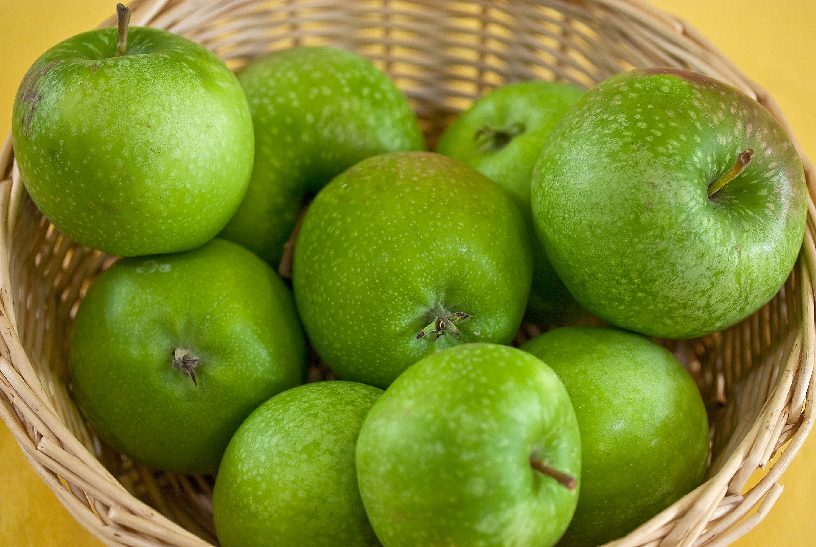 Der Granny Smith ist eine Apfelsorte